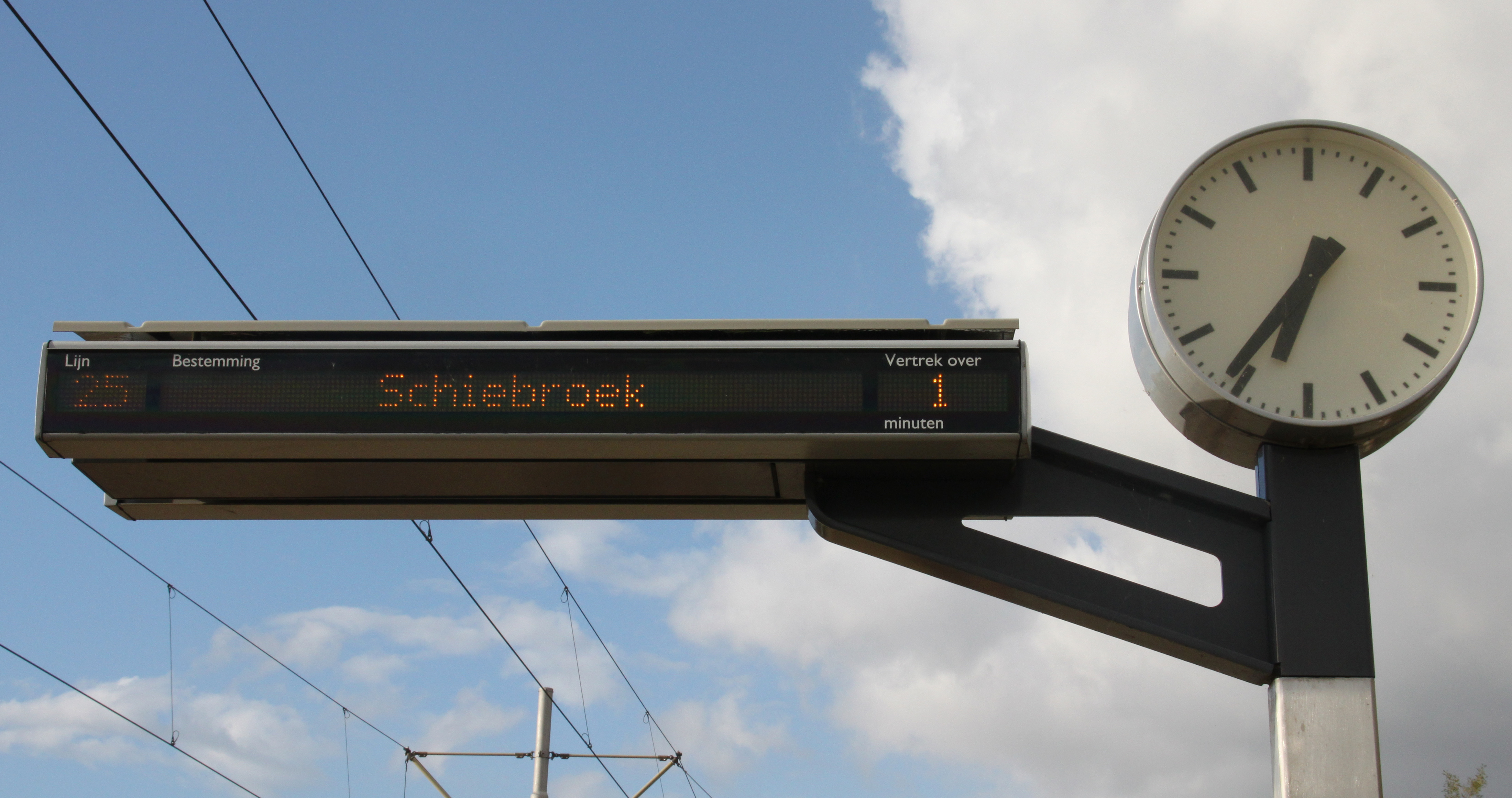 DRIS-display van de tram in Rotterdam/Barendrecht.